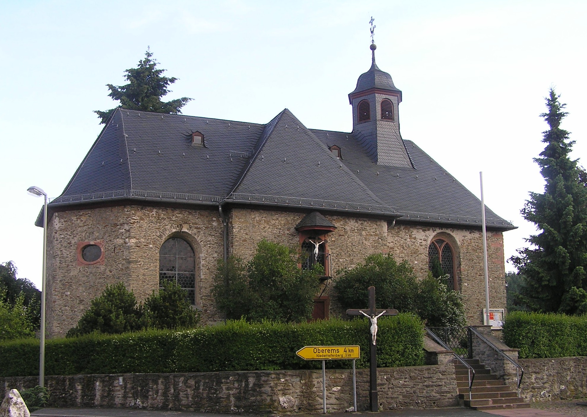 Kirche von Seelenberg, Deutschland